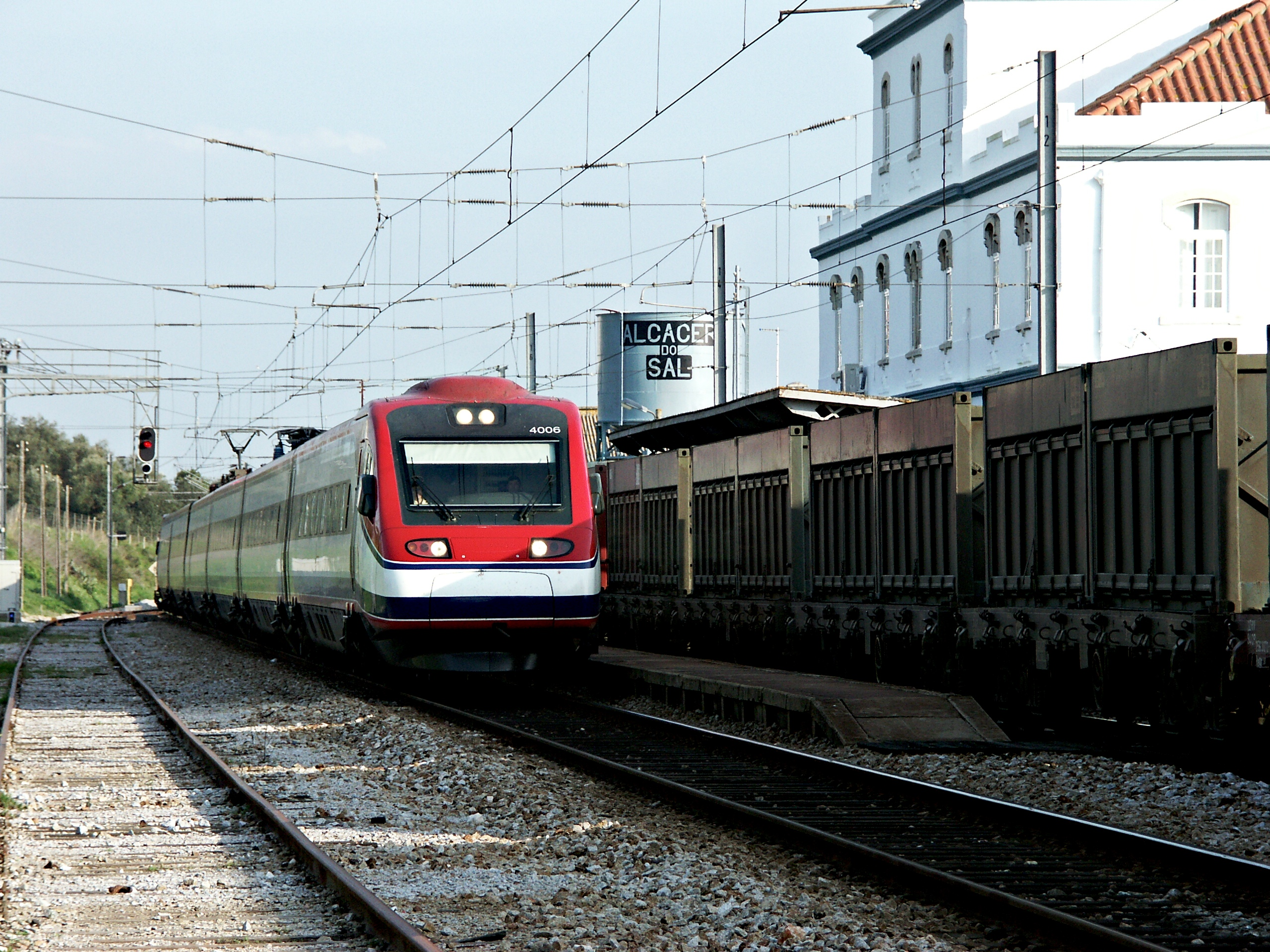 Tipo: Comboio Alfa Pendular 184 [Faro - Porto • Campanhã] Local: Estação de Alcácer do Sal [Linha do Sul, PK 78] Data e hora: 11 de Março de 2008 [16h52] Material: Automotora 4006 [Comboio de Pendulação Activa] a aguardar cruzamento na via D: Locomotiva 1911 com o Somincor descendente [Praias do Sado - Ramal Somincor]